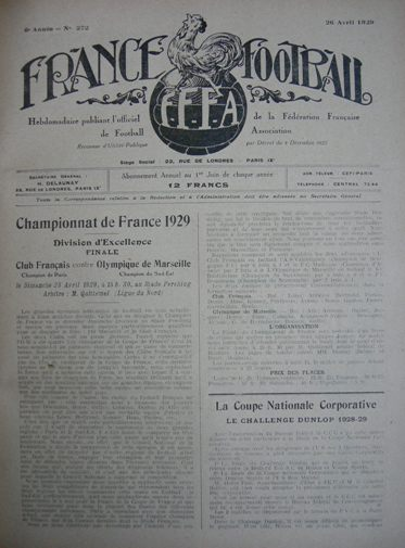 France-Football no.272 du 26 avril 1929, édité par la Fédération française de football association.